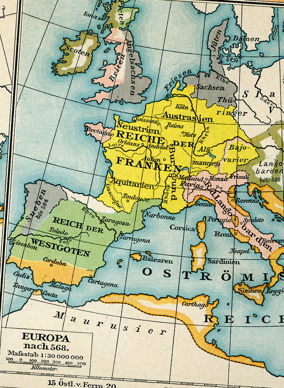 Regno dei Visigoti nell'Europa del 563 d.C cartina tratta da Putgers Historischer Schulatlas (1849-1913)